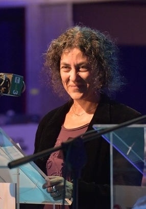 Maria Grazia Calandrone al PRIX ITALIA, Torino 23.9.15